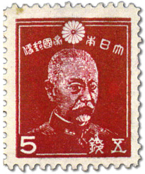 OSS Togo stamp forgery, 5sen, 1945